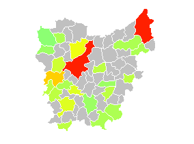 Locatie van Finse pistes in de Belgische provincie Limburg (met kleurschakering voor afstandsgradering). Indien er meerdere pistes aanwezig zijn wordt de langste weergegeven.